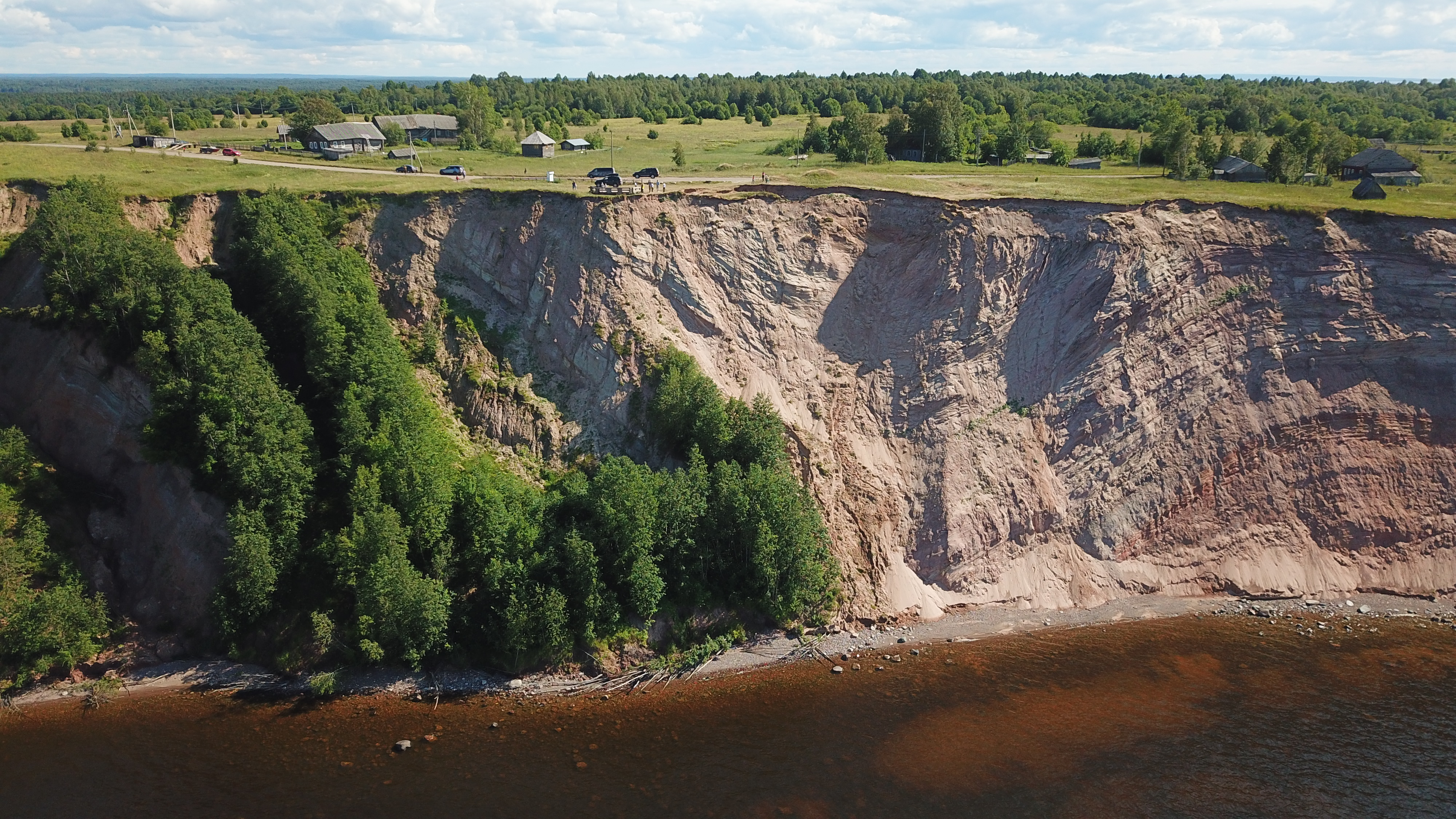 гора Андом